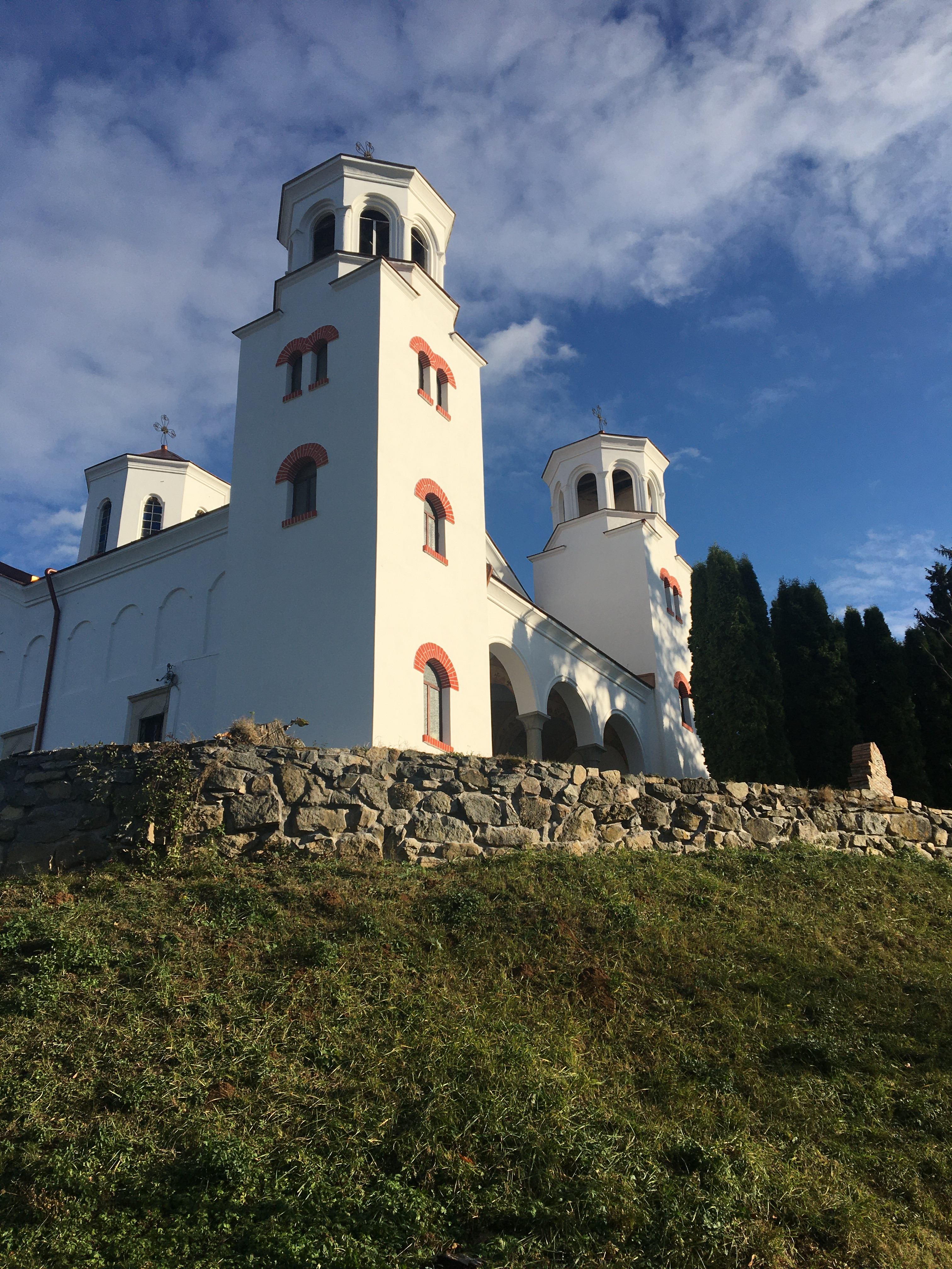 Клисурски манастир